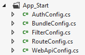 Конфиг файловете в папка Апп Старт